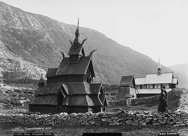 Borgund stavkyrkje og Borgund kyrkje (Borgund stave church and Borgund church, Lærdal kommune, Sogn og Fjordane fylke, Norway). Picture taken in the periode 1880 - 1890.